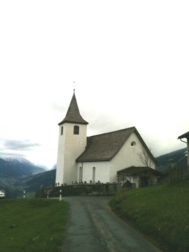 reformierte Kirche Furna, Kanton Graubünden